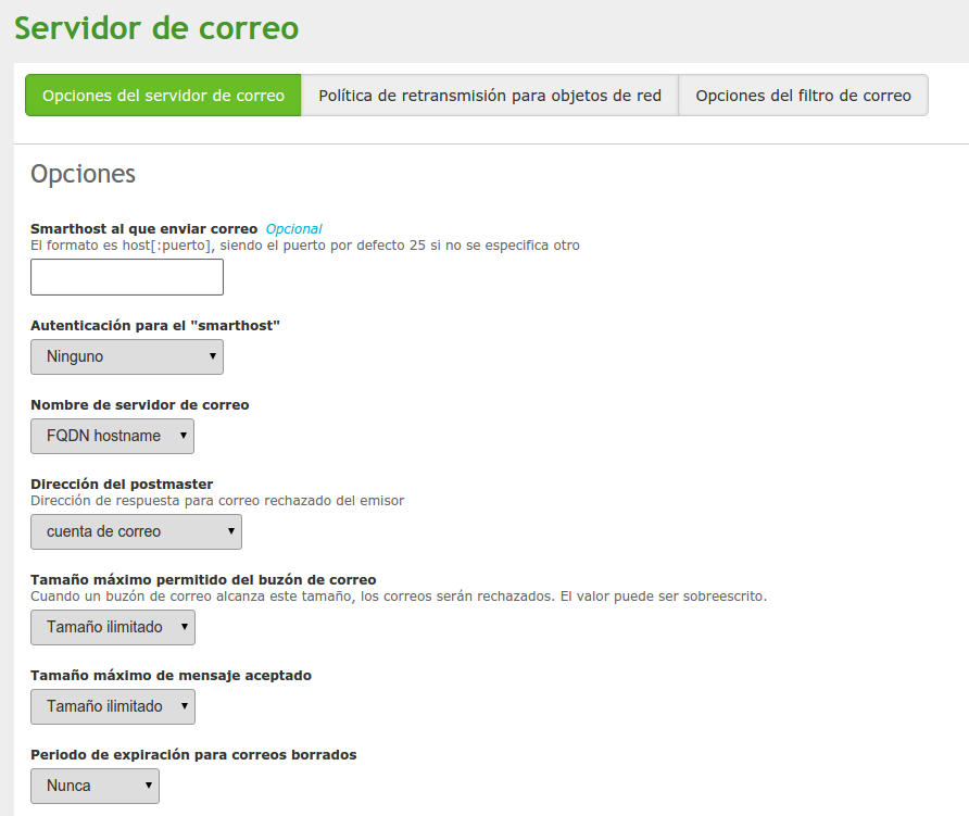 Zentyal, sección de correo electrónico